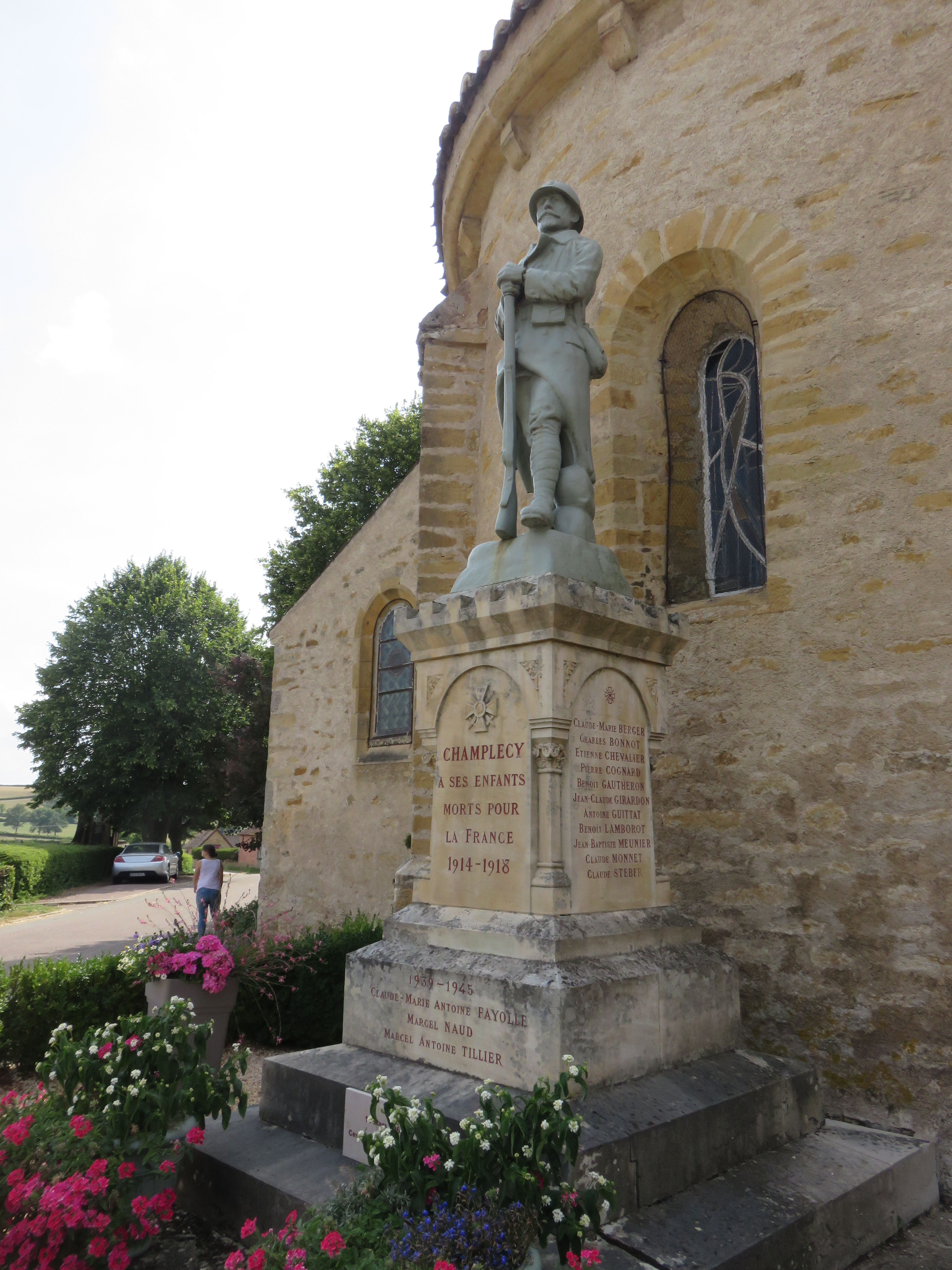 Monument aux morts de Champlecy (Saône-et-Loire, France).